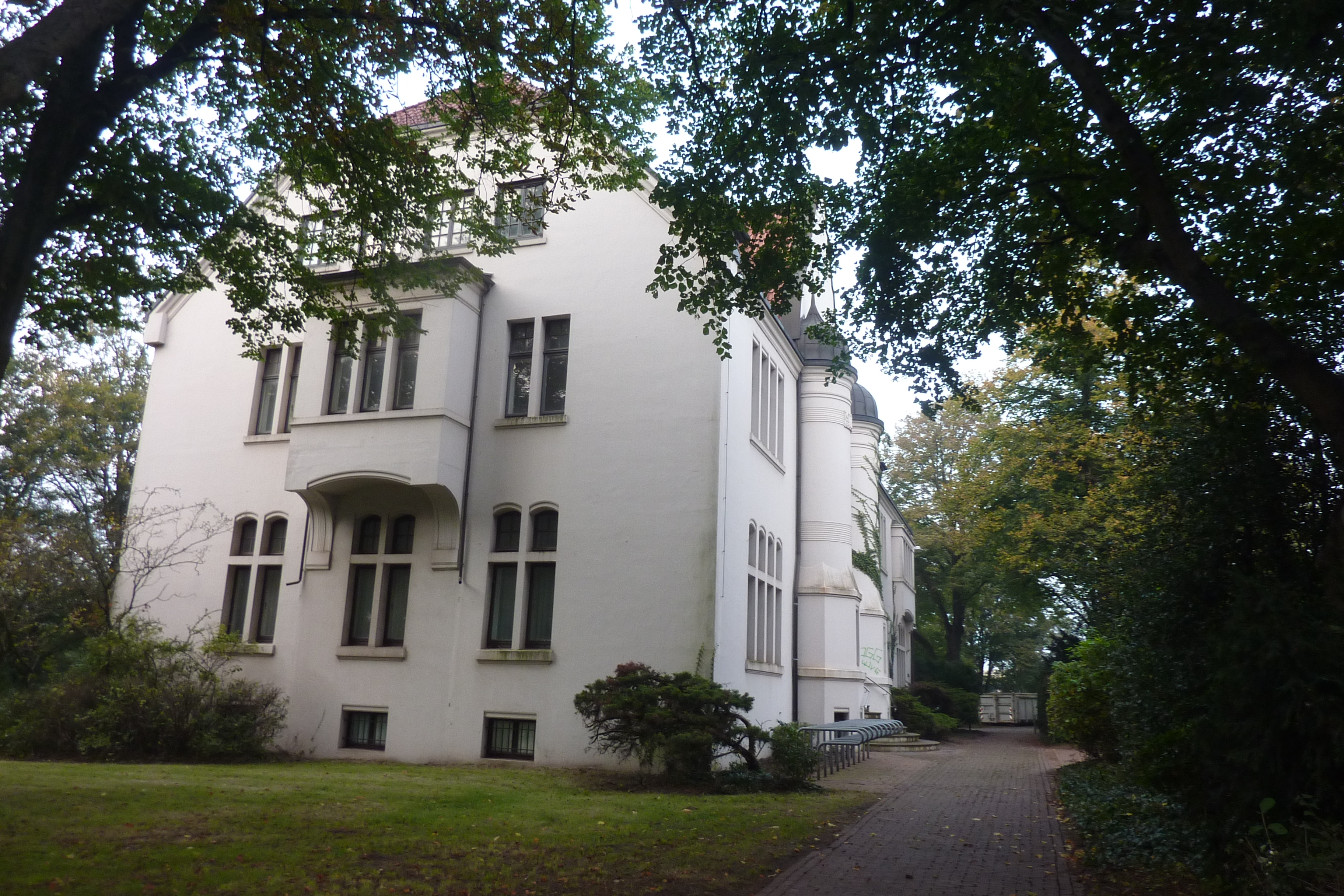 Rathaus Hemelingen in Bremen, Rathausplatz 1.Das abgebildete Objekt ist ein geschütztes Kulturdenkmal in der Freien Hansestadt Bremen, mit der Nr. 0421 beim Landesamt für Denkmalpflege registriert.